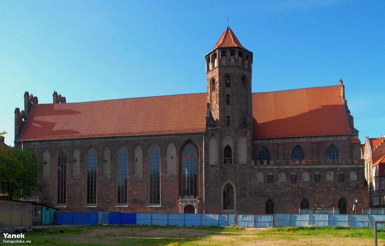 Gdańsk Główne Miasto, ul. Świętojańska 72 - kościół klasztorny dominikanów, obecnie rzymskokatolicki parafialny p.w. św. Mikołaja (Bazylika mniejsza), XIII, 2 poł. XIV, XV (widok z ul. Szerokiej)